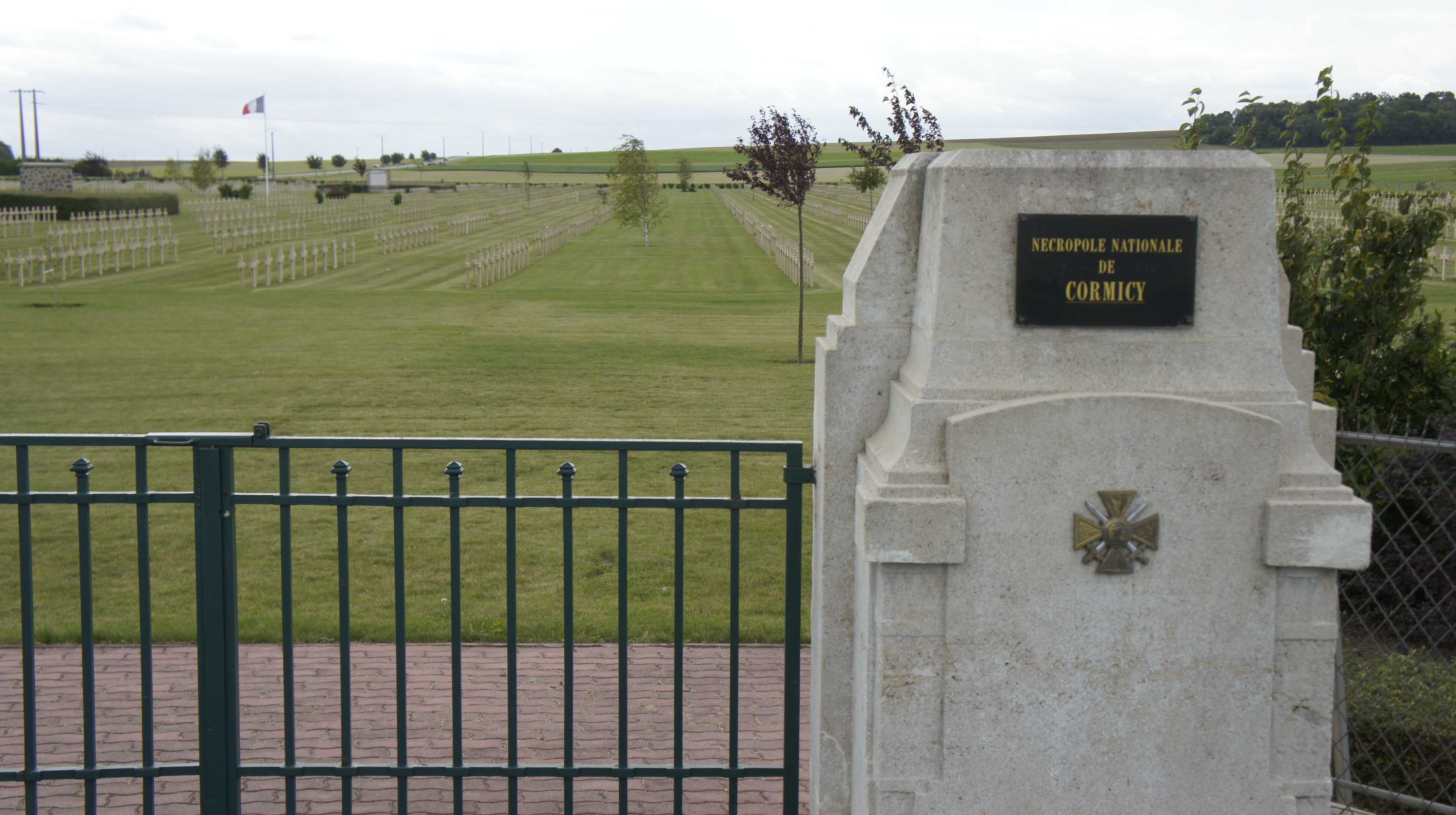 Nécropole nationale Cormicy.